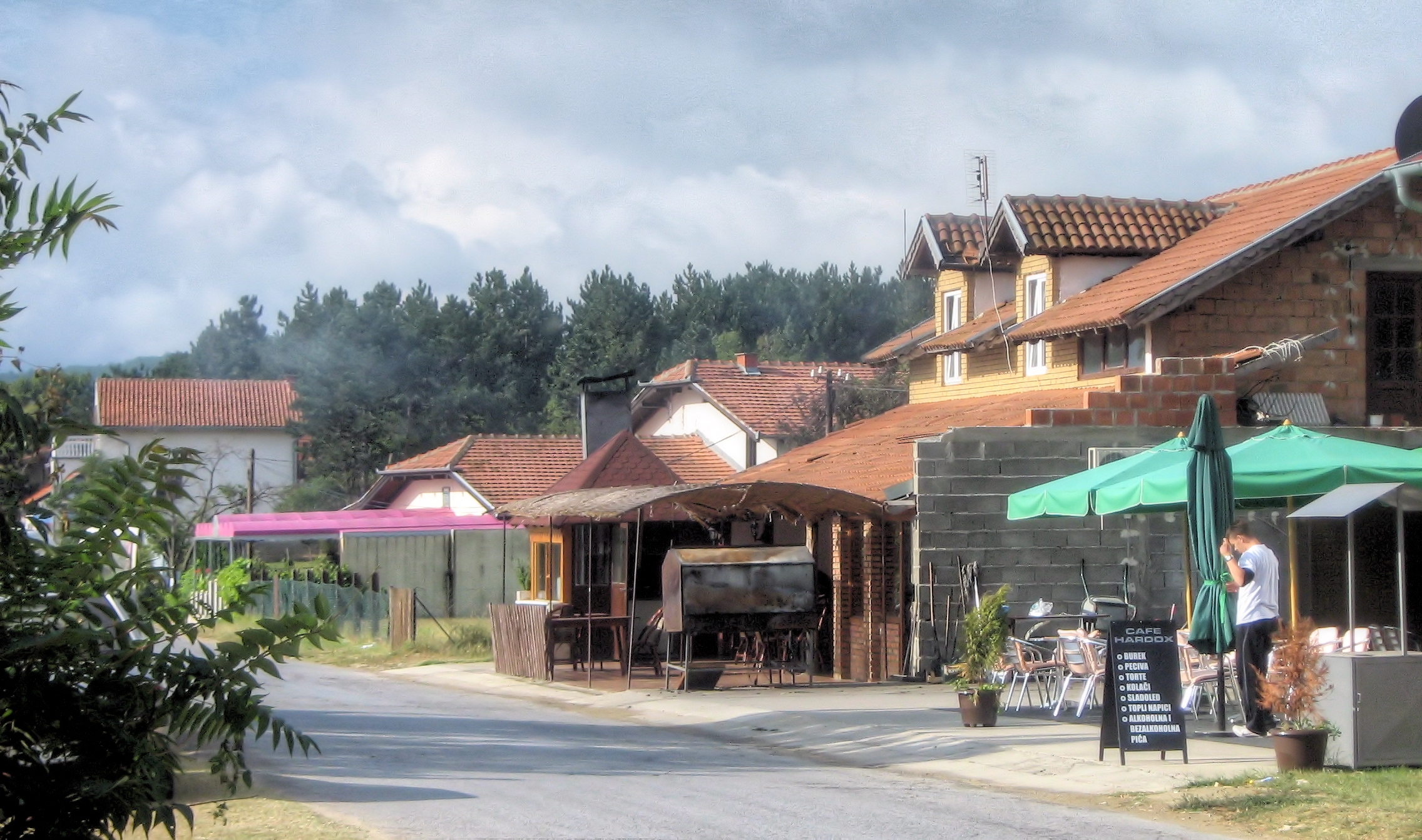 Центар викенд населја Винци.